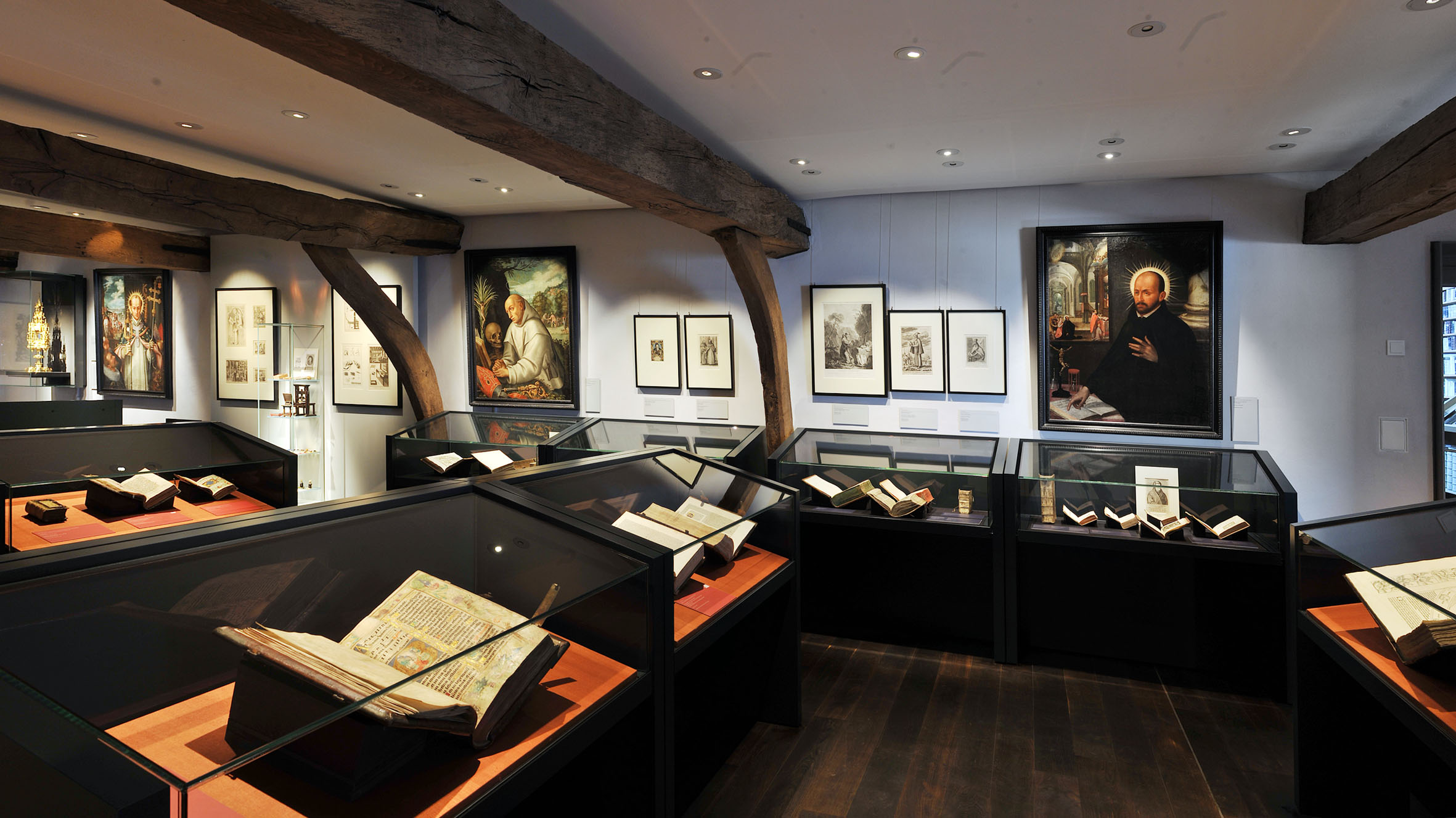 StiftsMuseum Xanten, Raum 10